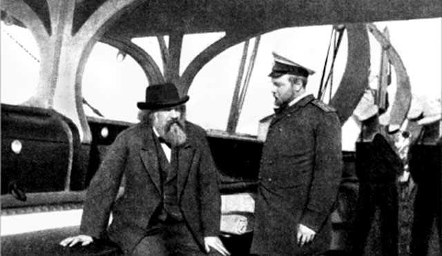 Otec a syn Mendělejevovi při rozloučení před plavbou na Dálný východ